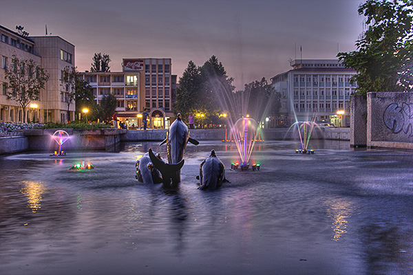 Търговище - Център. Снимка Русалин Илиев